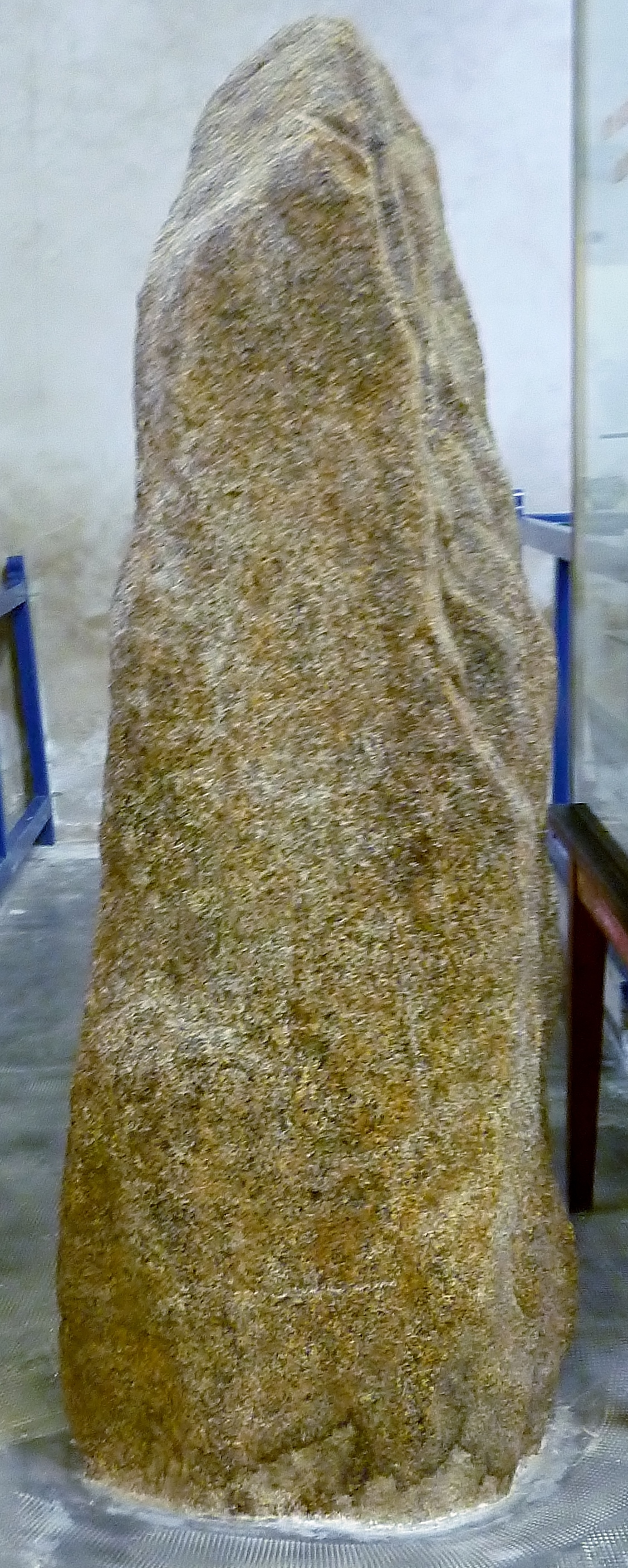 Le menhir gravé de l'isthme de Kermorvan dans la commune du Conquet (Musée de la préhistoire finistérienne de Penmarc'h)